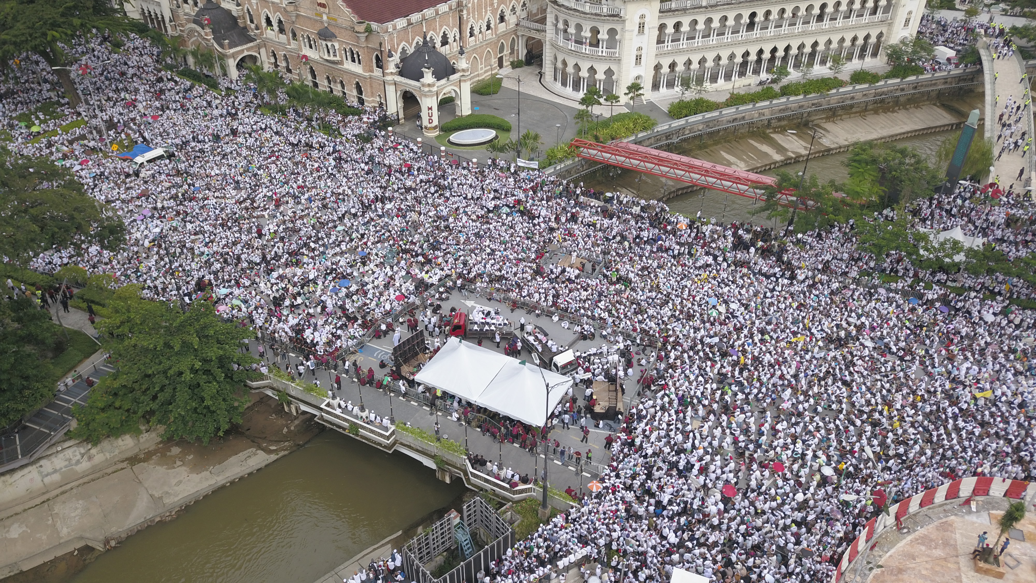 Jalan di sepanjang Dataran Merdeka, Kuala Lumpur sesak dan penuh dengan peserta Himpunan Bantah ICERD (Himpunan 812).